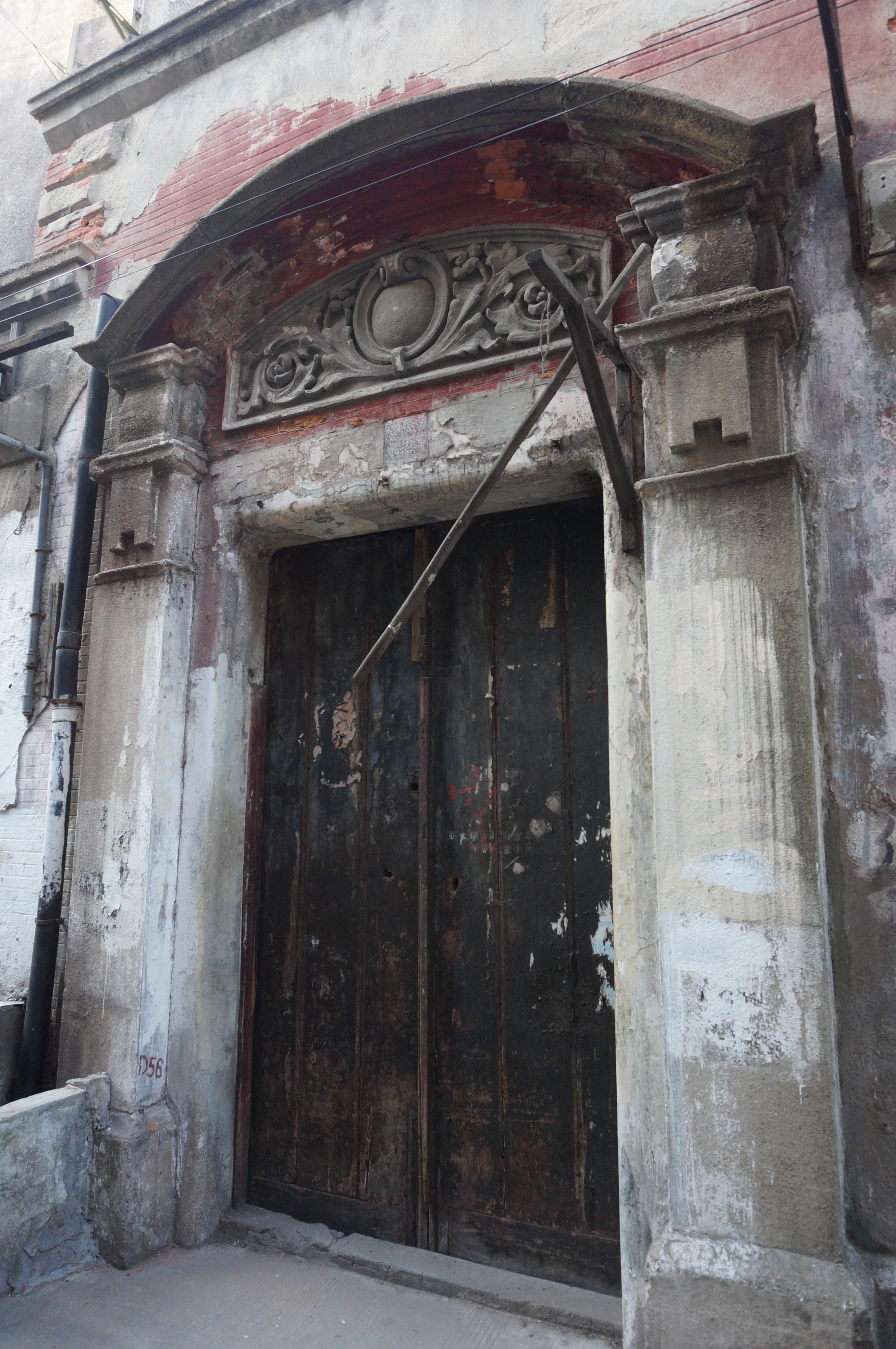 东斯文里被拆除前夕的石库门大门